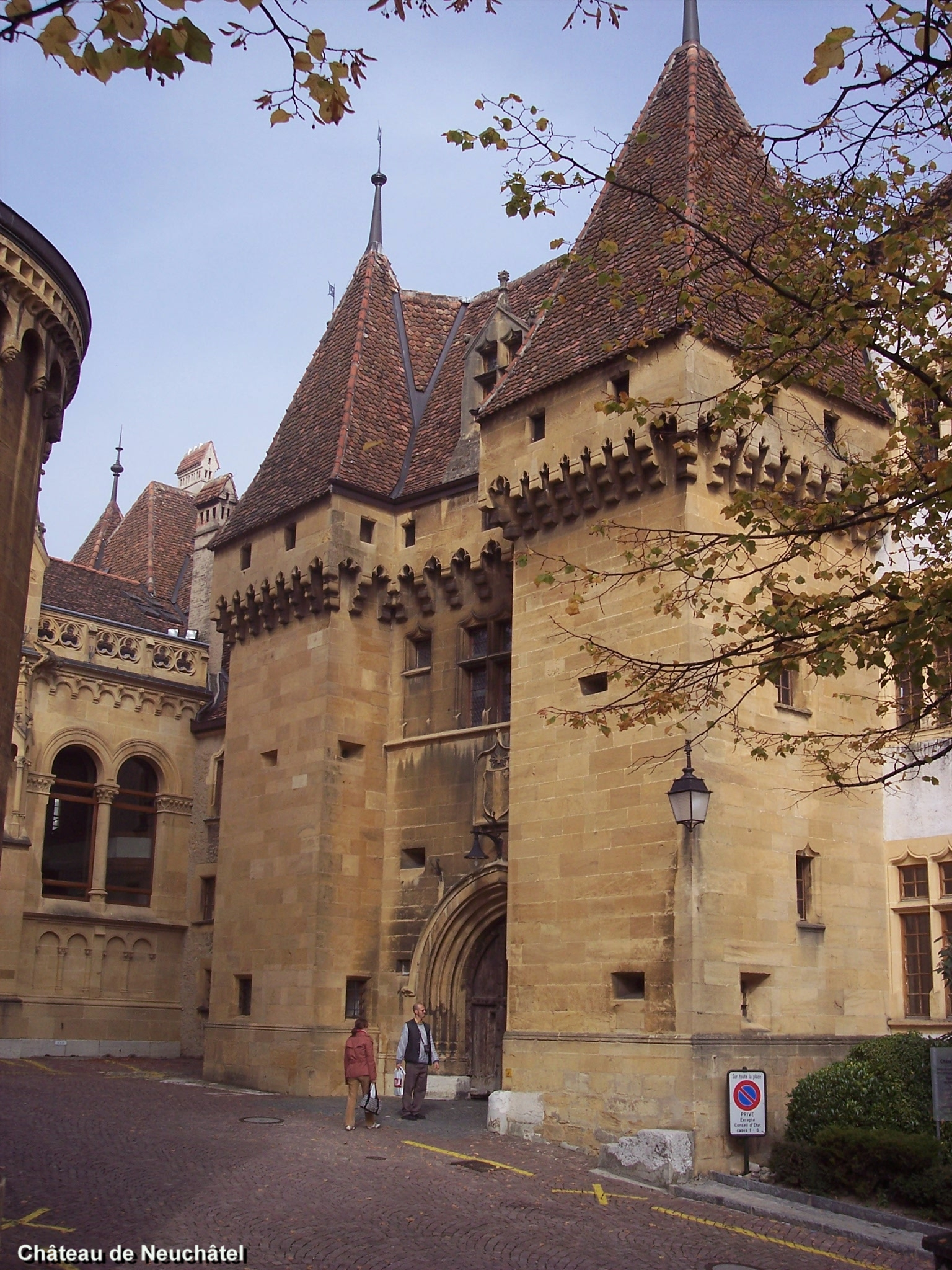 Façade sud et entrée du château de Neuchâtel. Suisse.